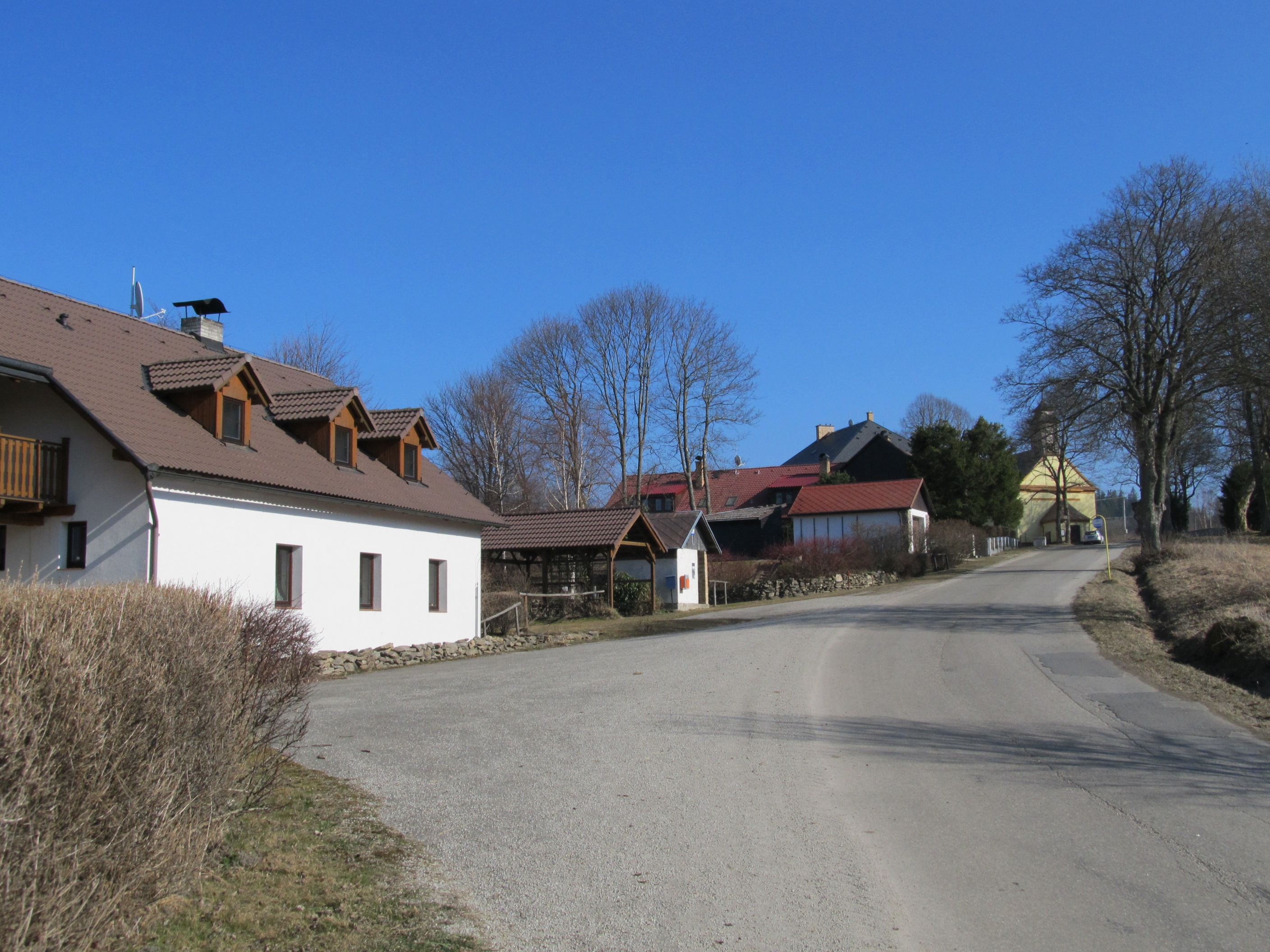 Křišťanov